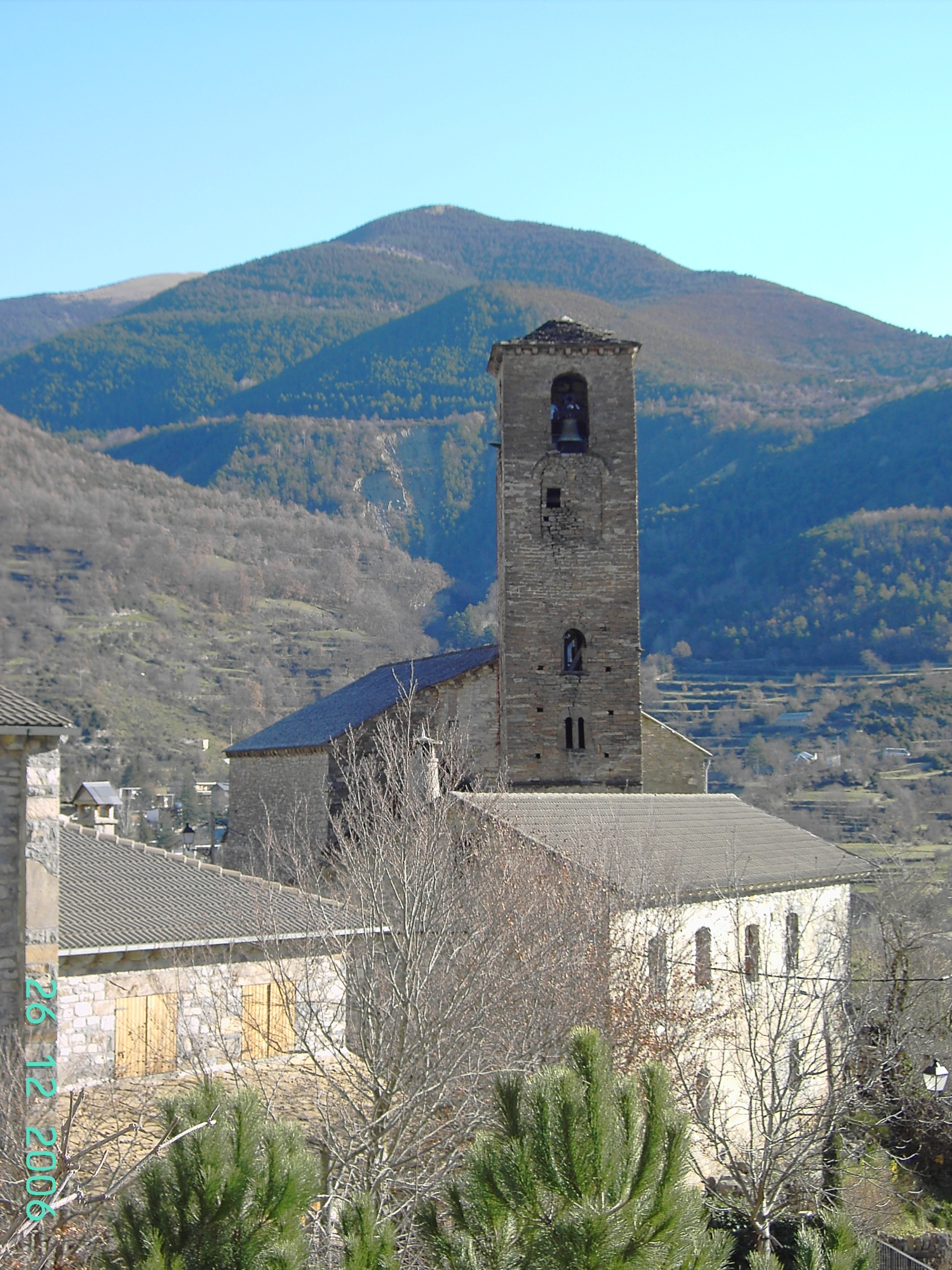 Vista de la iglesia, de estilo Románico Aragonés, de Oto, en el Valle de Broto.